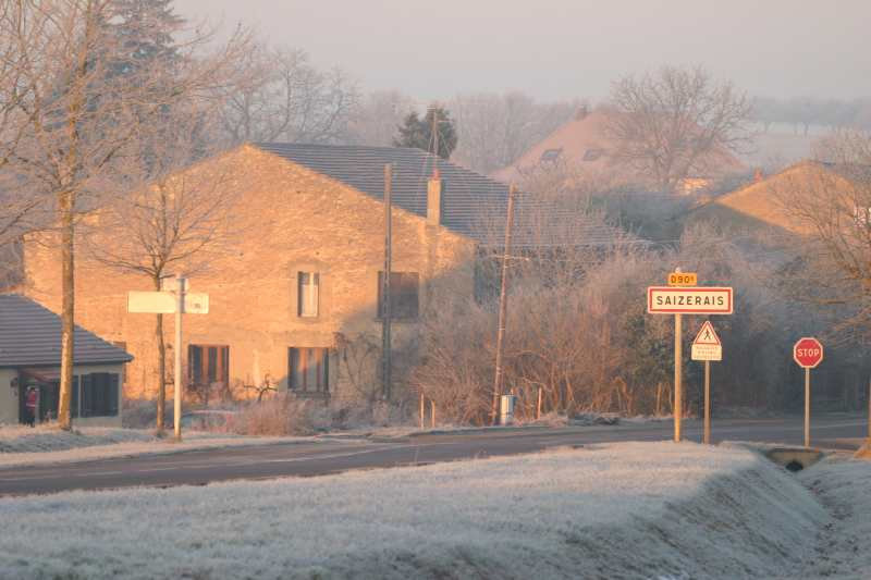 Matin d'hiver à l'entrée du village